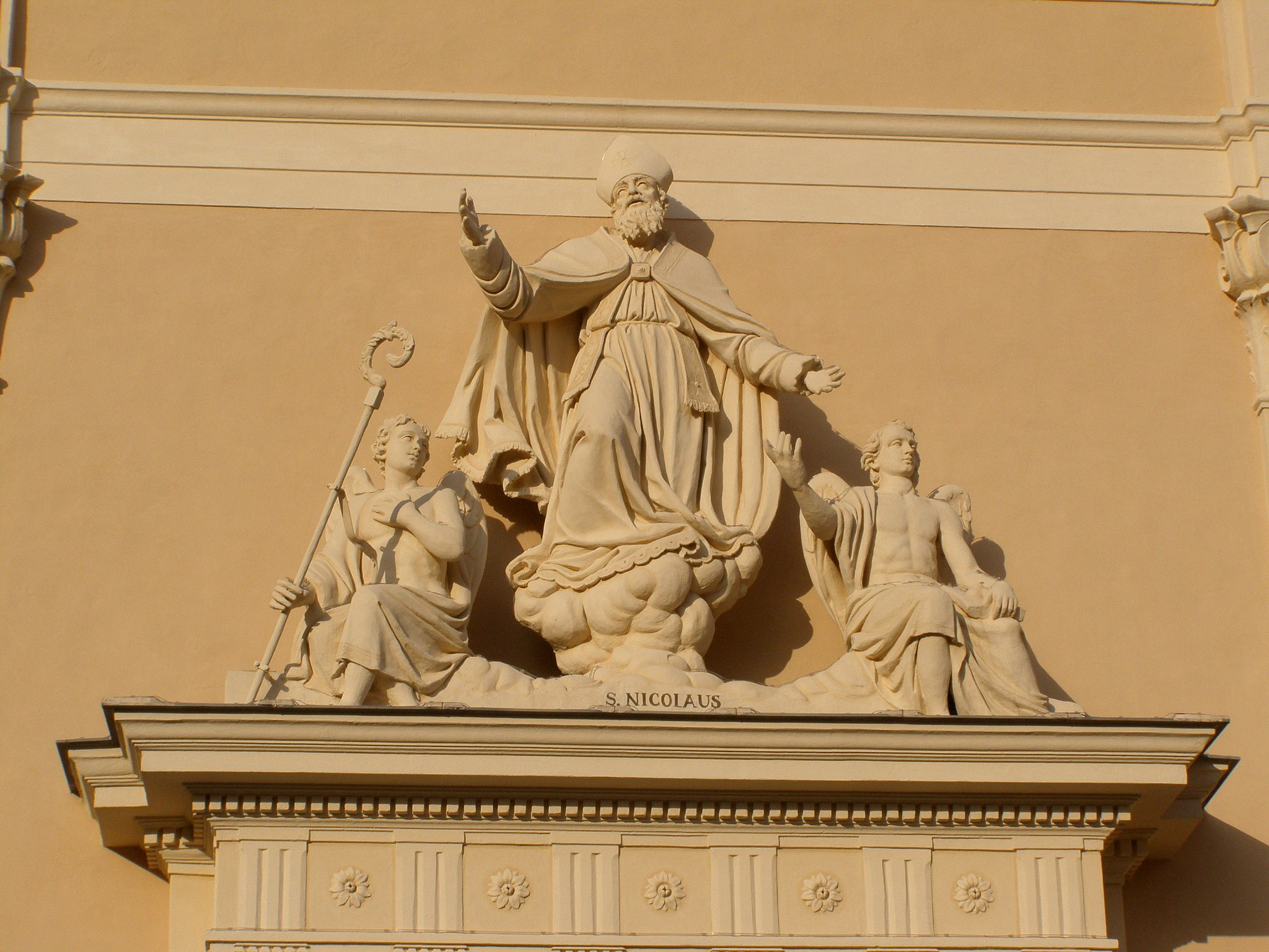 Súsošie svätého Mikuláša na rímse nad hlavným vchodom do baziliky